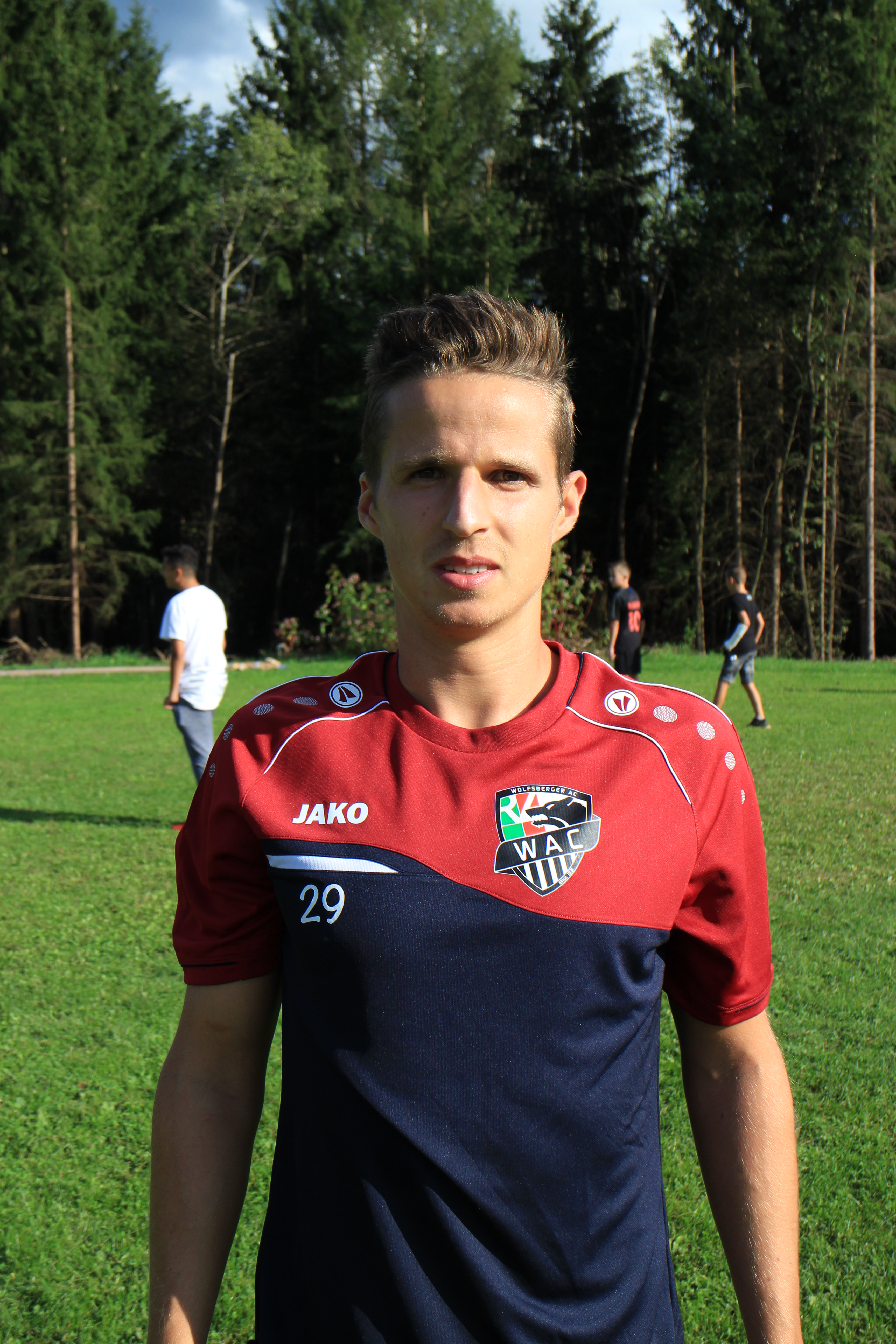 Gerald Nutz (WAC)